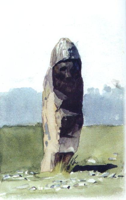 Этюд В.И. Сурикова "Каменная баба"